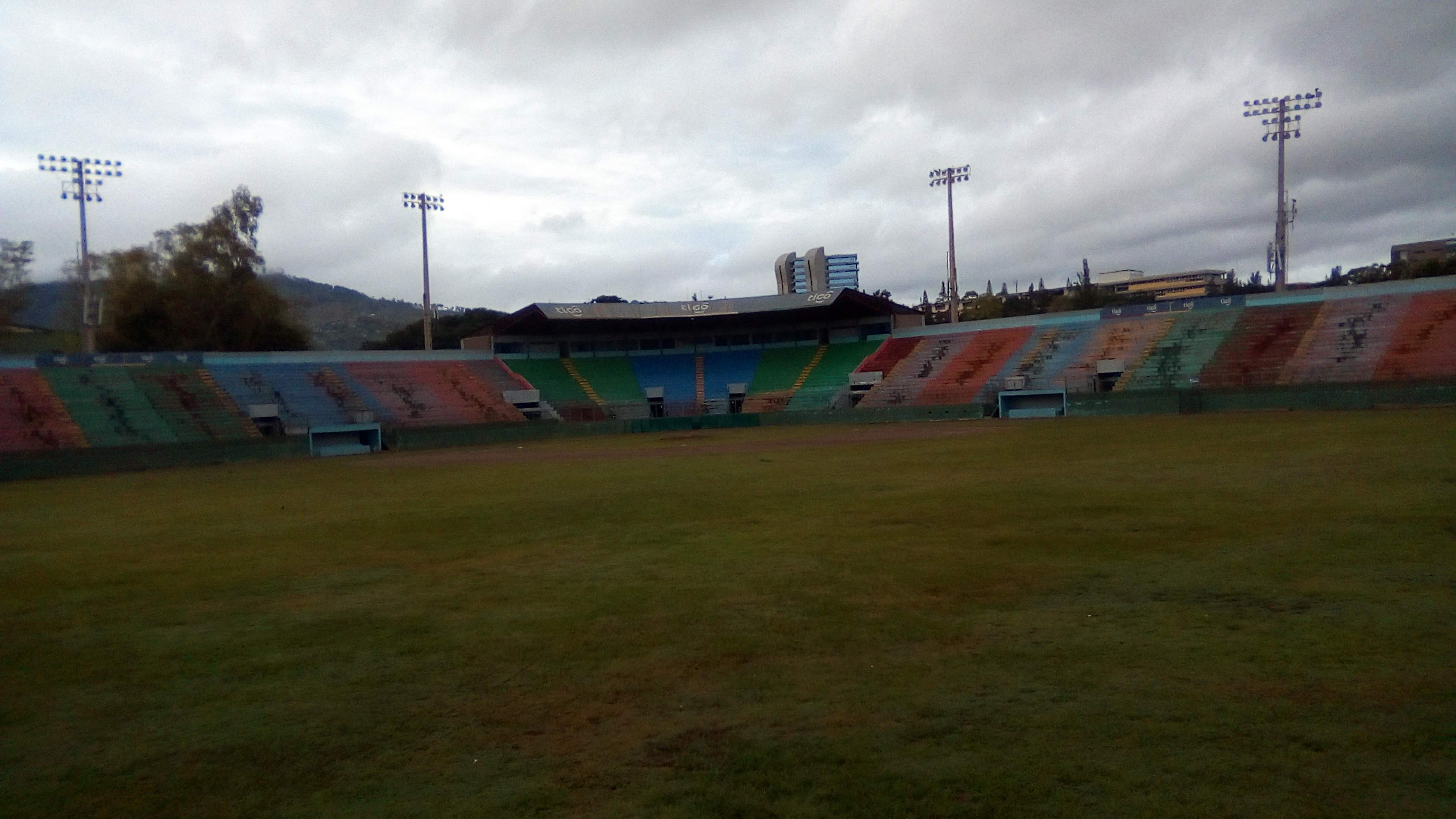 Dentrodelestadiodebeisbol